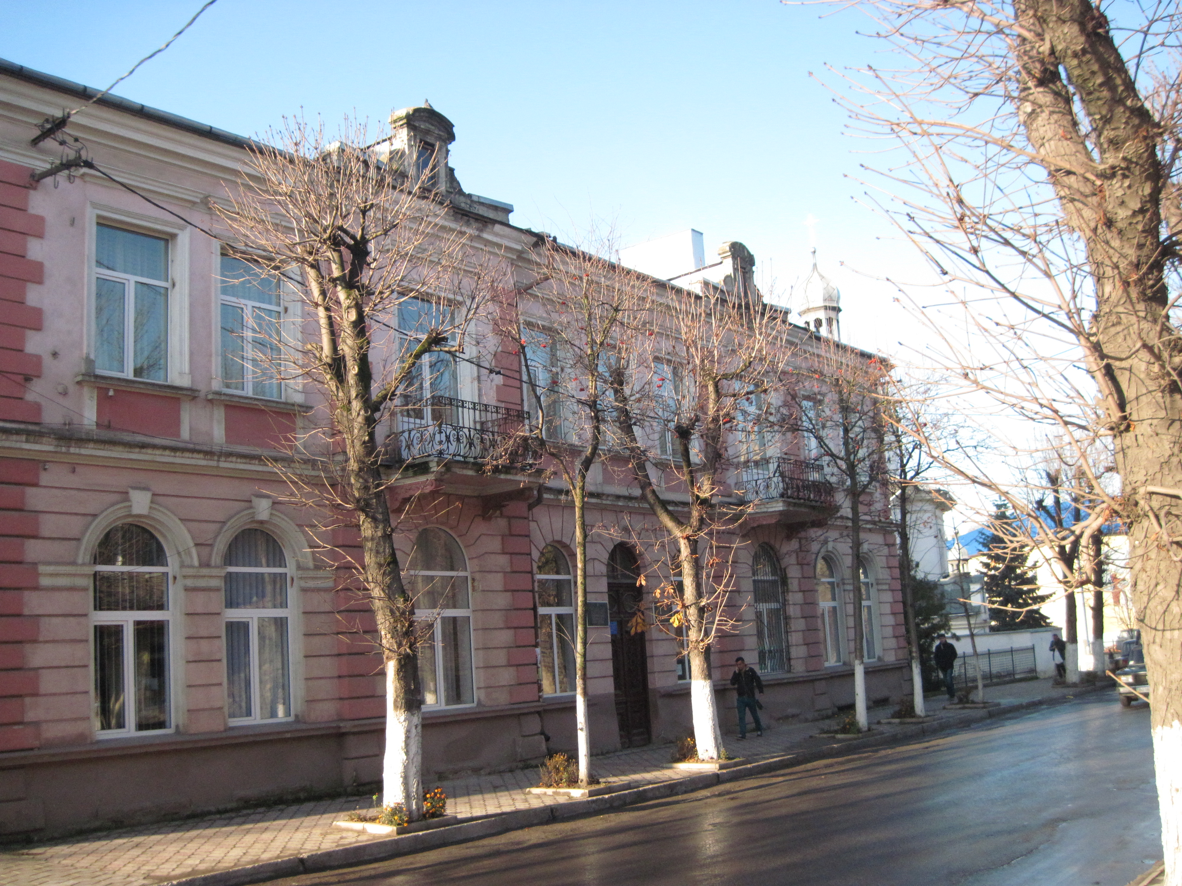 Центральна районна бібліотека. Бучач, осінь 2013